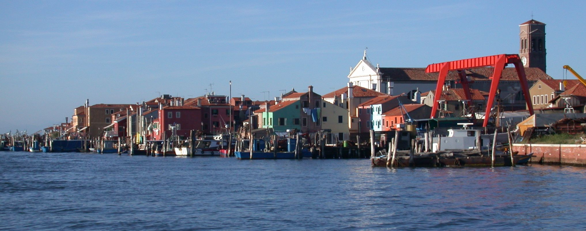 Pellestrina vista dal pontile della motonave